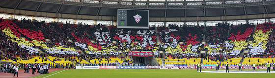 ОУКБ_Фратрия_2008